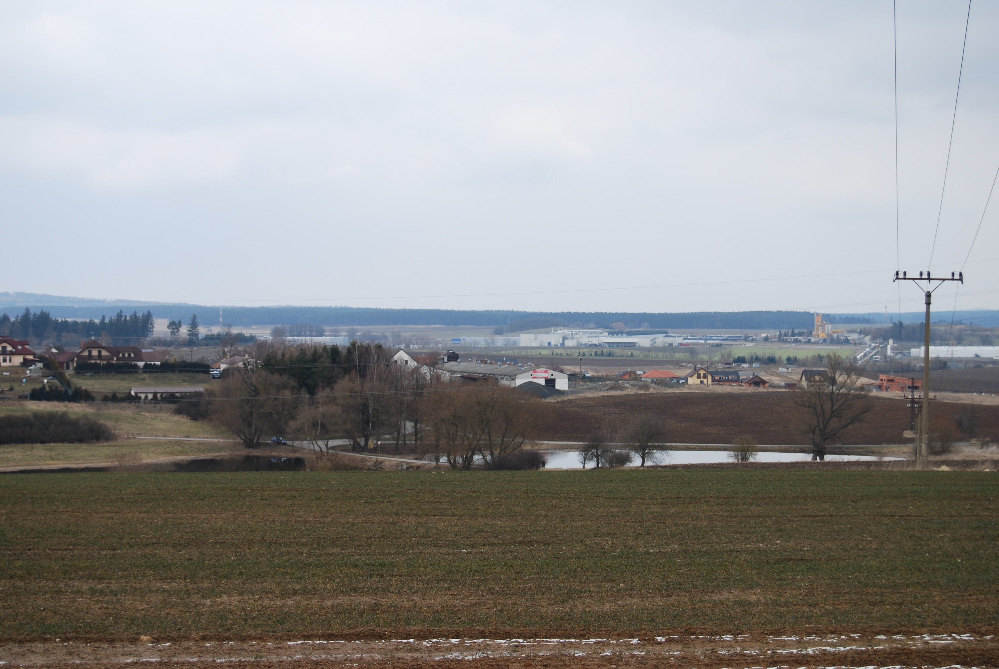 Pohled na Oldřichov a na Horní Sirotčí rybník a Dolní Sirotčí rybník od silnice ke hřbitovu. Oldřichov (Dobev). Okres Písek. Česká republika.